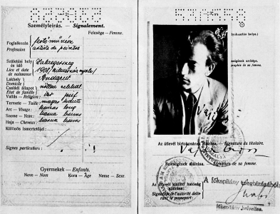 Passport